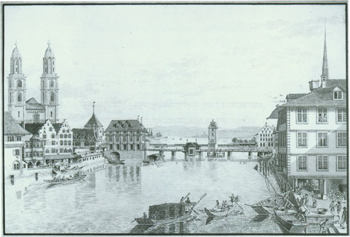 Zürich mit Blick auf den Zürichsee. Kolorierter Umrißstich, um 1780.